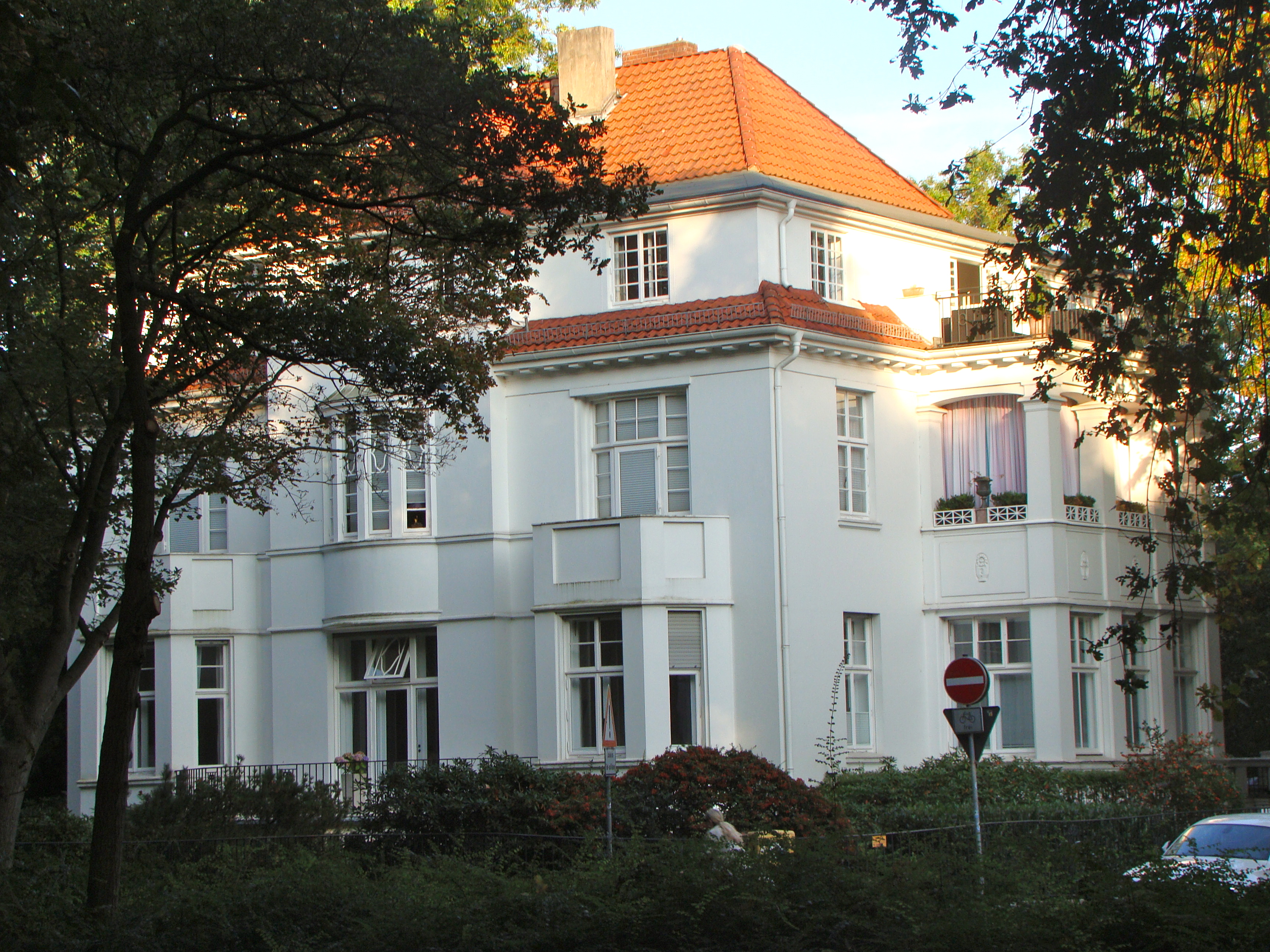 Villa Korff in Bremen, Parkallee 133.Das abgebildete Objekt ist ein geschütztes Kulturdenkmal in der Freien Hansestadt Bremen, mit der Nr. 1003 beim Landesamt für Denkmalpflege registriert.